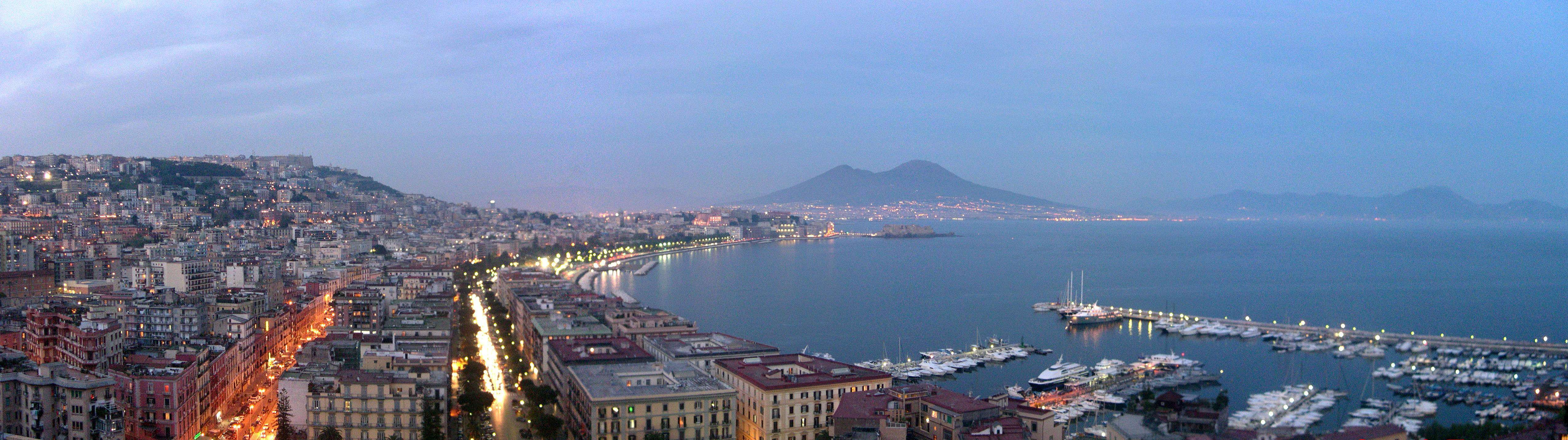 Naples